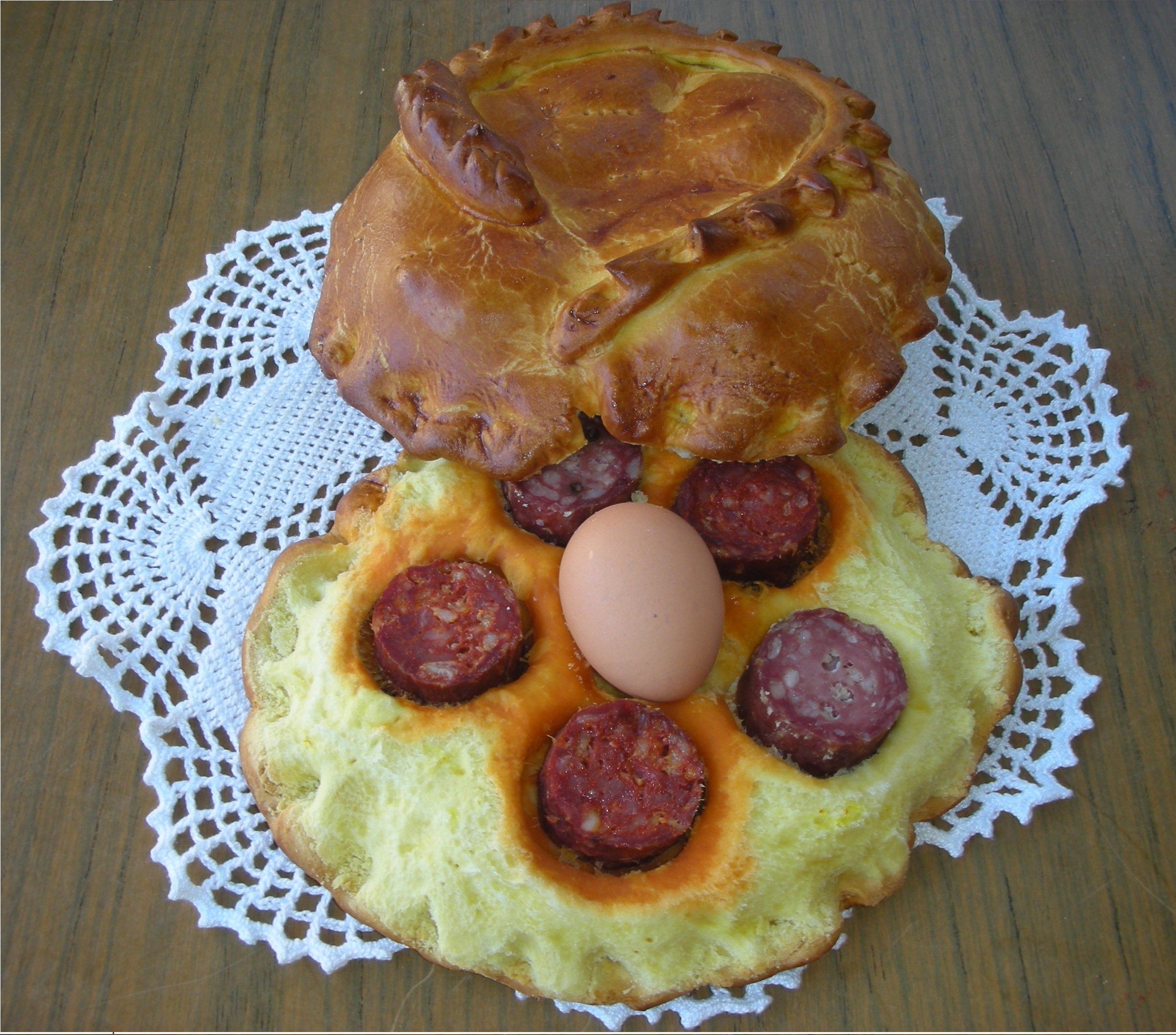 Empanada typique de la commune de Sotoserrano en Espagne